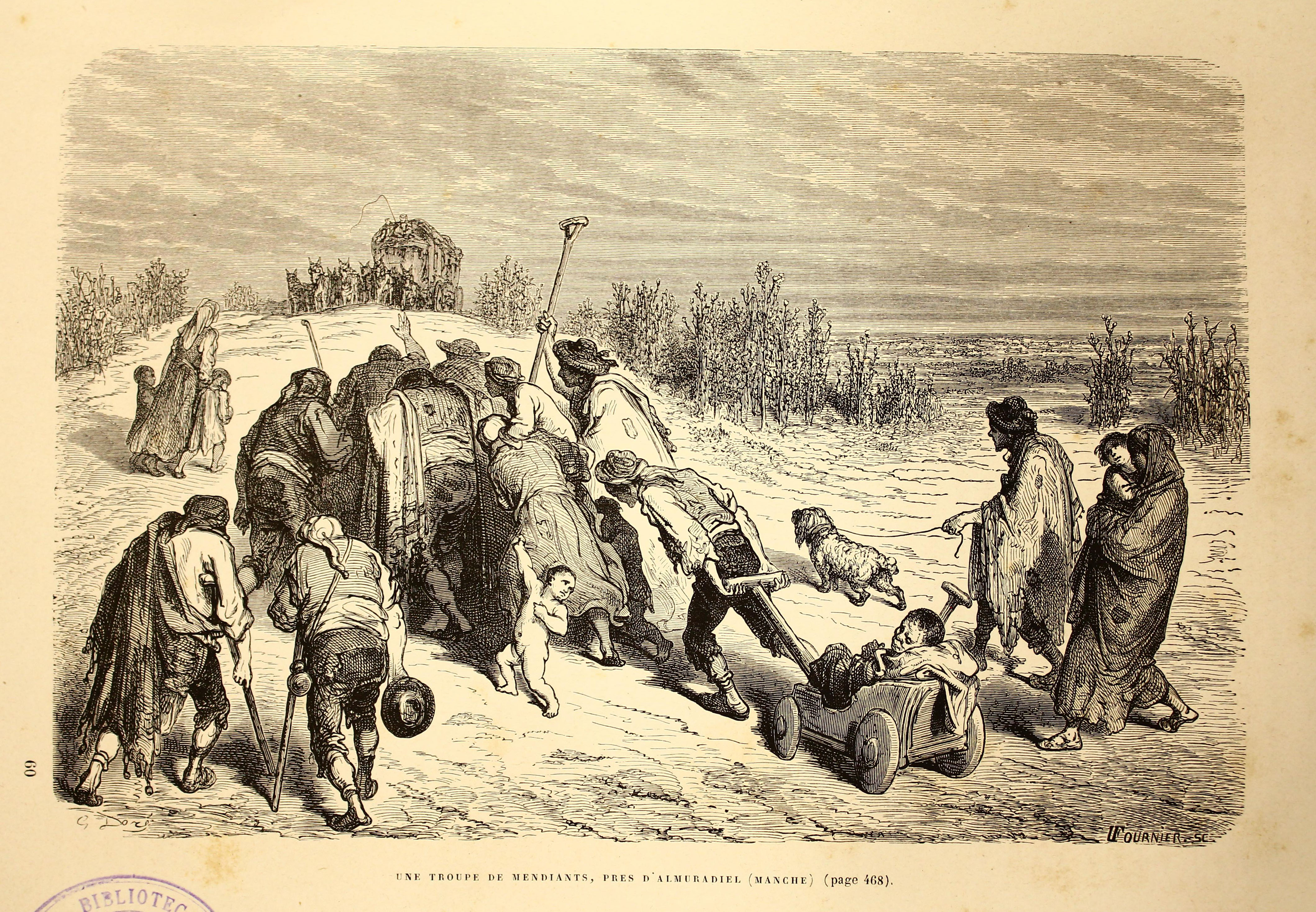 Autor: Davillier, Jean Charles, barón, 1823-1883 Descripción bibliográfica: L'Espagne / par Le Baron CH. Davillier ; ilustrée de 309 gravures dessinées su bois par Gustave Doré. - Paris : Librairie Hachette, 1874. - 799 p. : il. Materia: España- Geografía Materia: España- Usos y costumbres Ilustrador: Doré, Gustave, 1832-1883 Editor: Libreria Hachette Lugar de impresión: Francia, París Localización: Libro completo